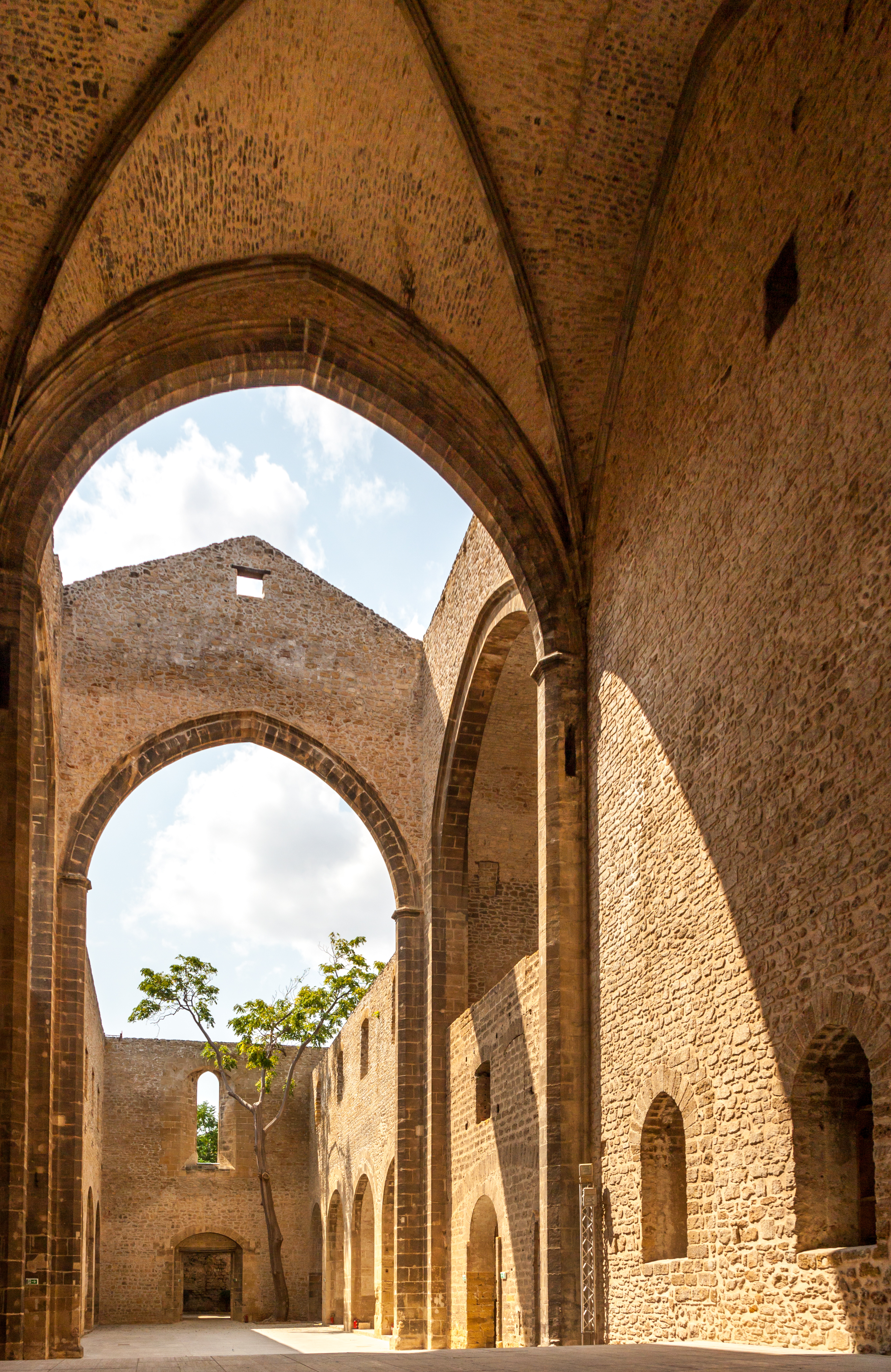 Chiesa di Santa Maria dello Spasimo This is a photo of a monument which is part of cultural heritage of Italy.